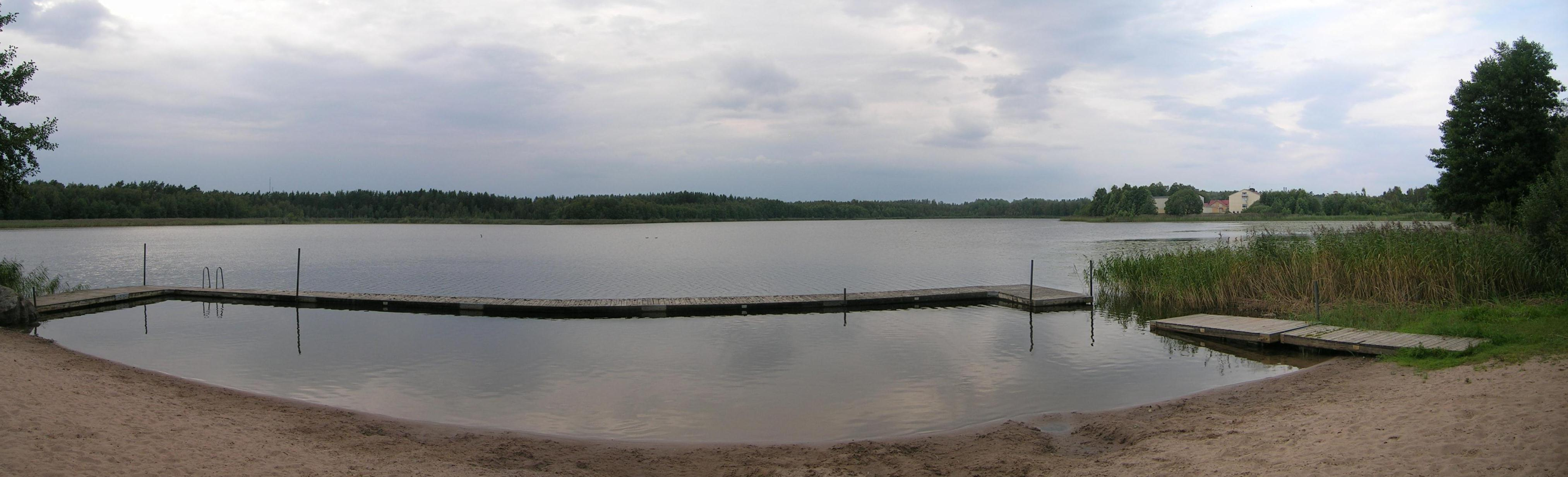 Badplatsen vid Axsjön